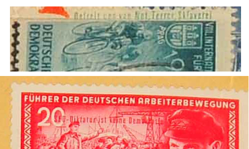 DDR-Briefmarken Mi.-Nr. 470 (oben) und 475 (unten) mit gefälschtem Propagandaaufdruck des Fälschers Willi-Peter Kleine.